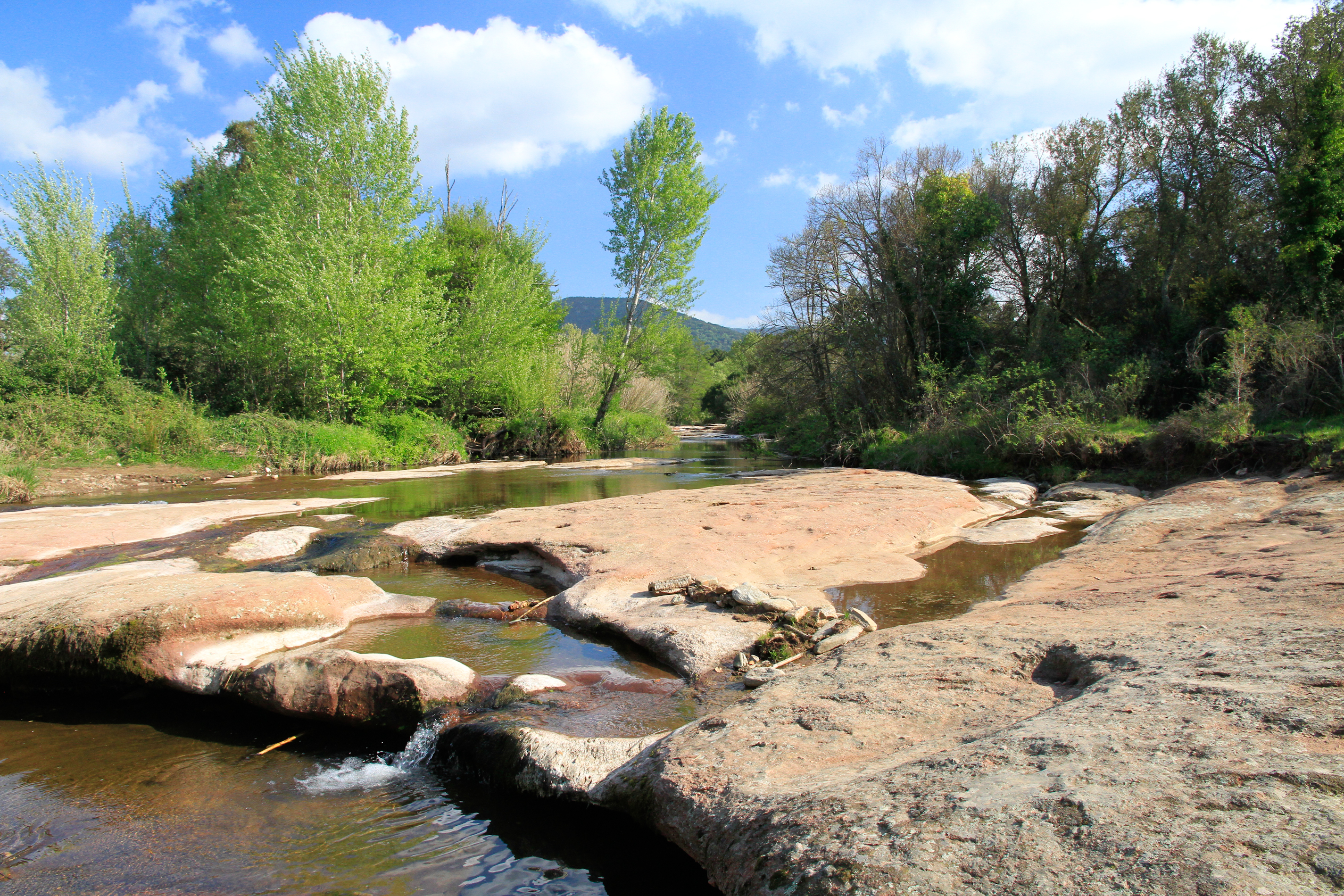 cours d'eau permanent dans la RNN de la plaine des Maures